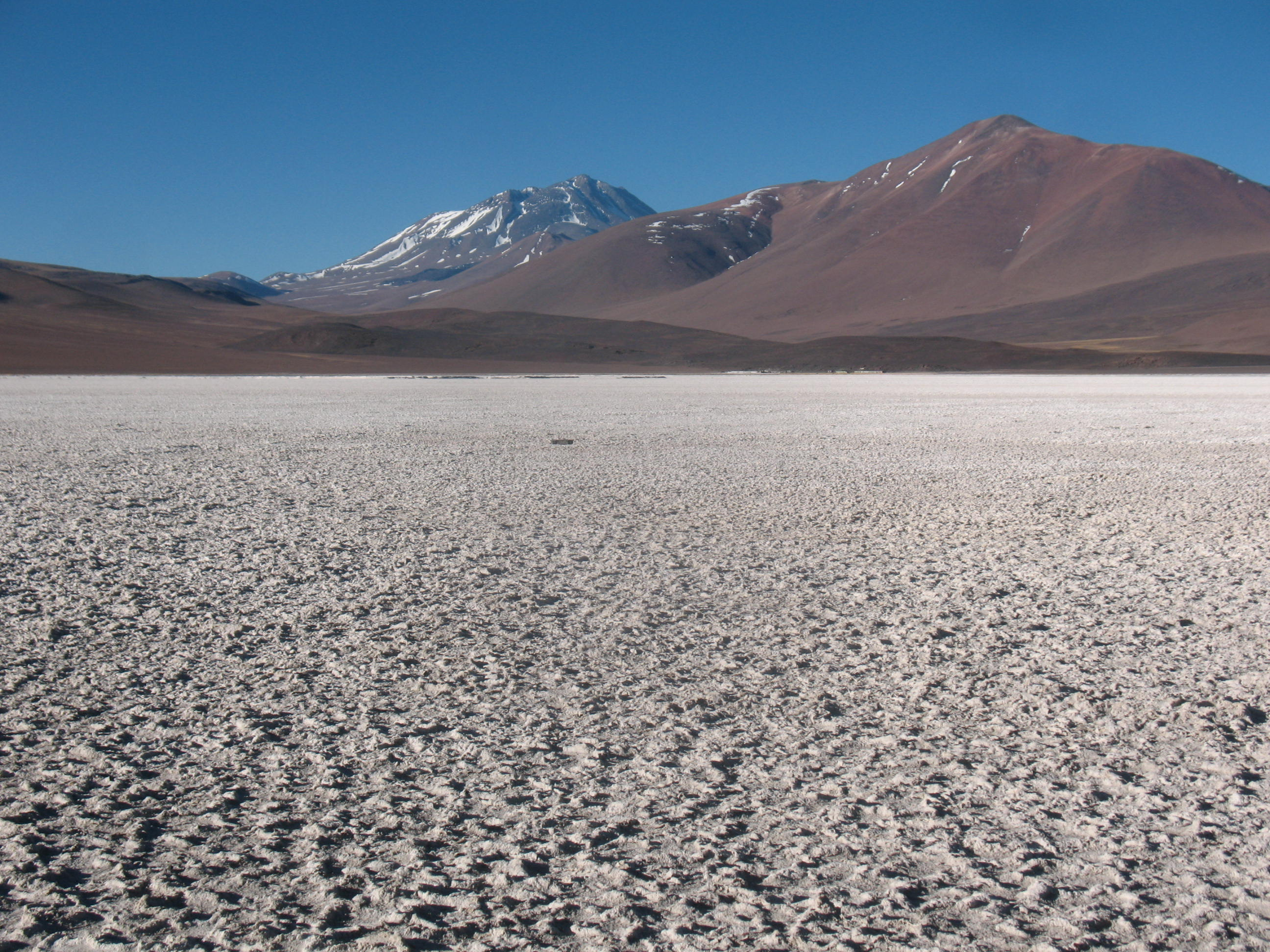 Al fondo destaca el cerro Llullaillaco, el tercero más alto de Chile.